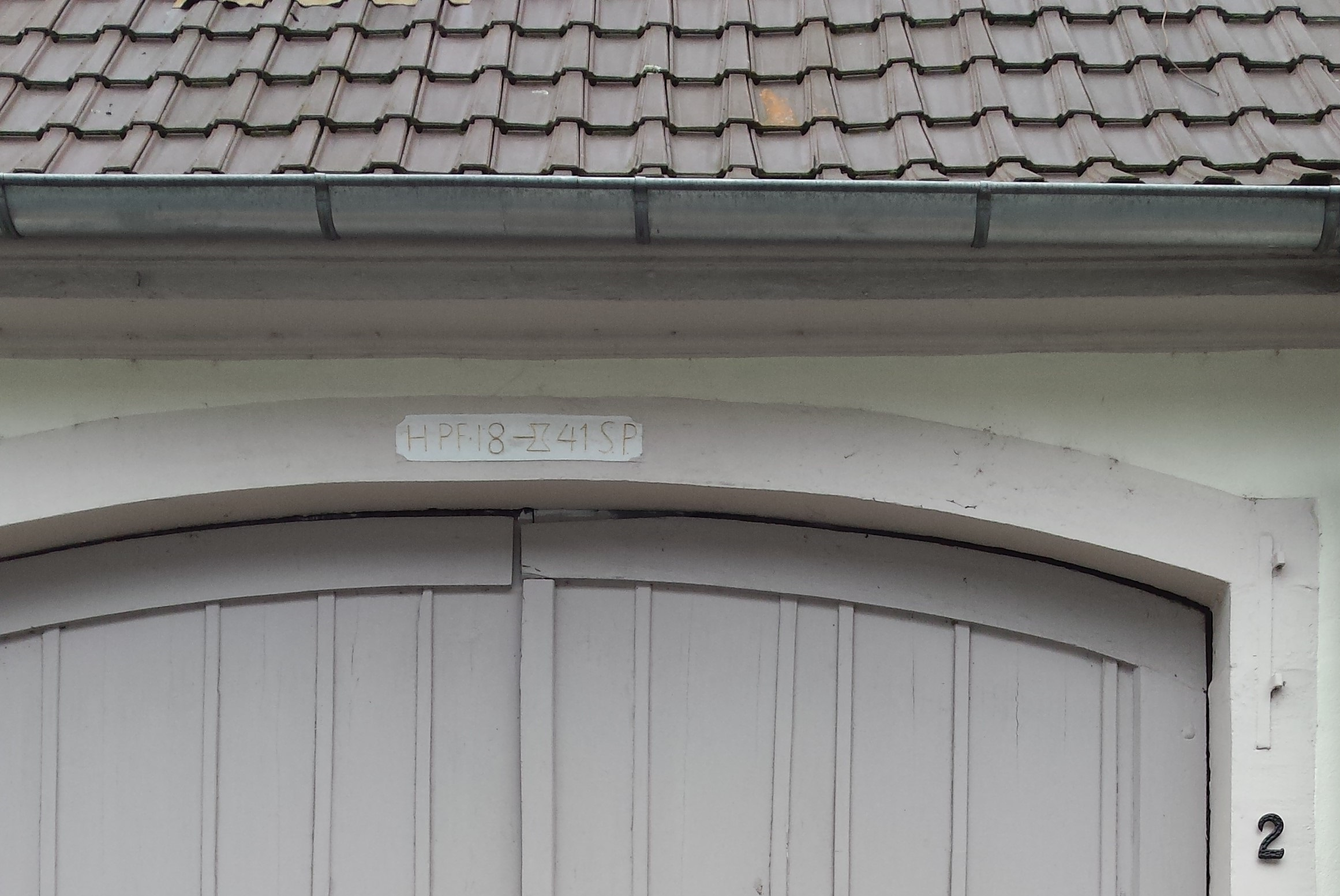 Der Torbogen des Museum Blau in Schwetzingen zeigt die Jahreszahl 1841.